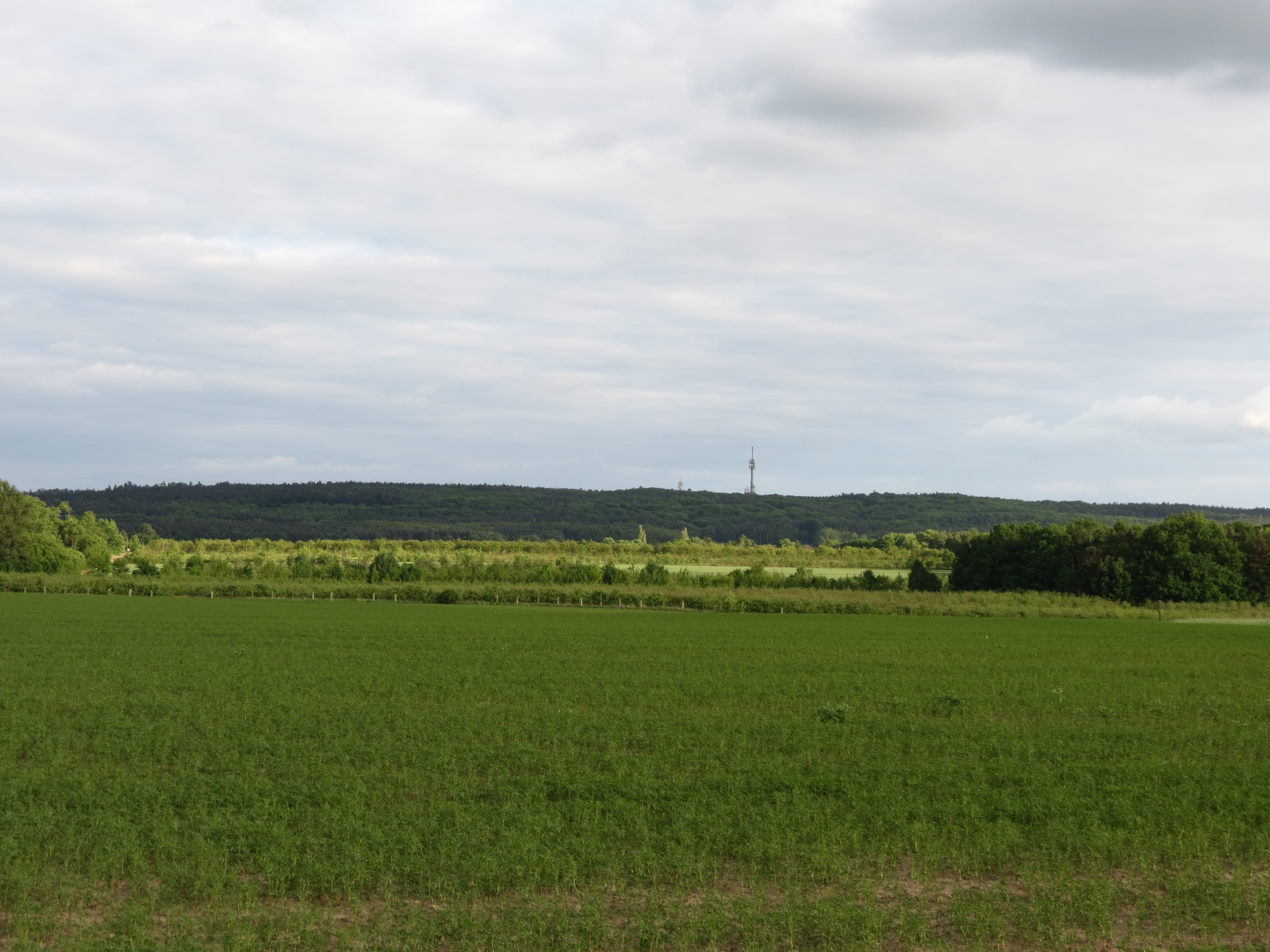 Die Rauener Berge von Norden her fotografiert (Fürstenwalder Biermansberg)